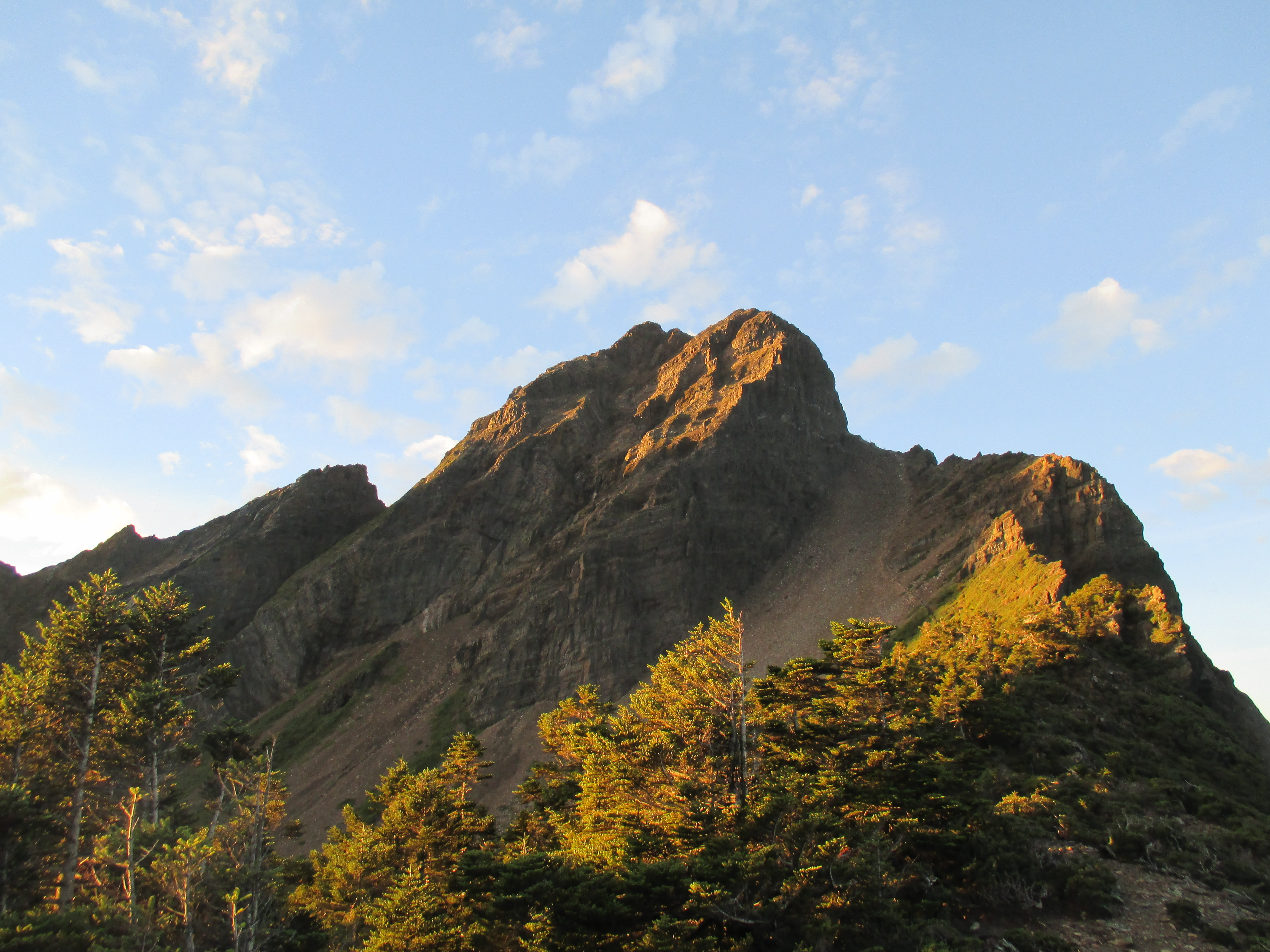 晨曦灑落在玉山主峰上，定靜中帶著一絲莊嚴